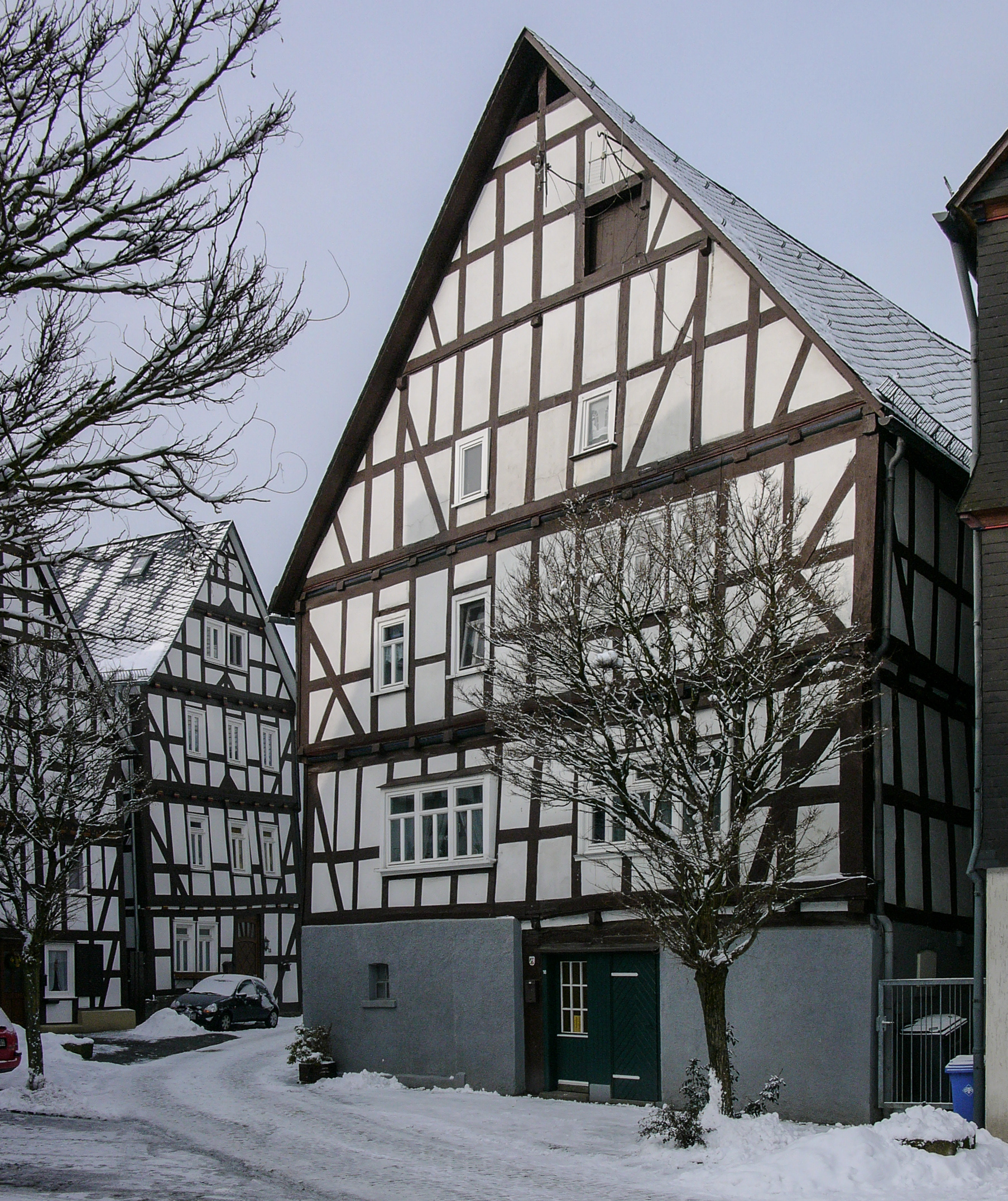 Bad Laasphe, historischer Stadtkern, historische Bürgerhäuser